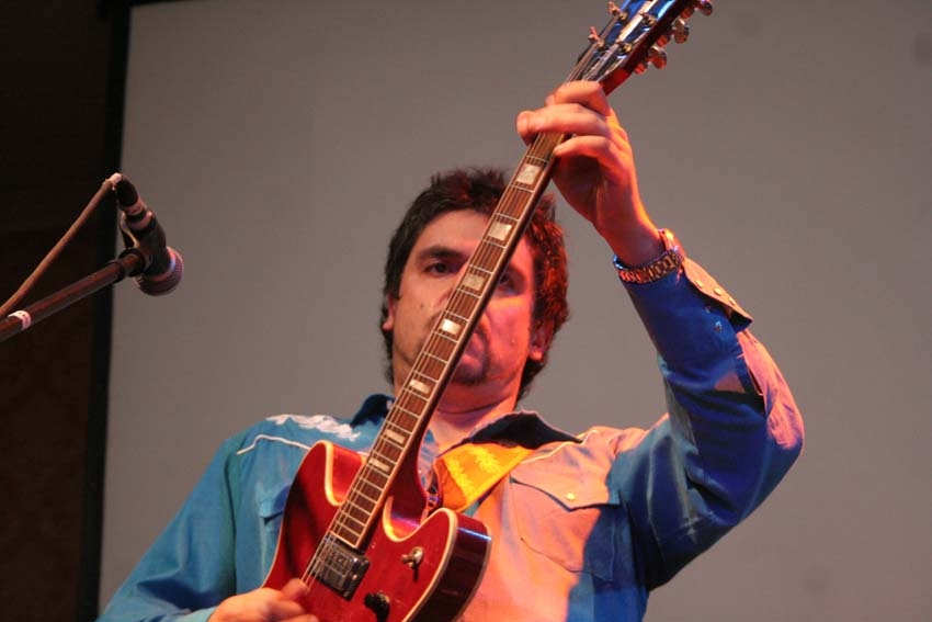 Ángel Cereceda Orrego (n. 22 de mayo de 1966) en Santiago de Chile, más conocido como "El Padrino", es un músico chileno, hijo del también músico chileno Ángel Parra y nieto de Violeta Parra.